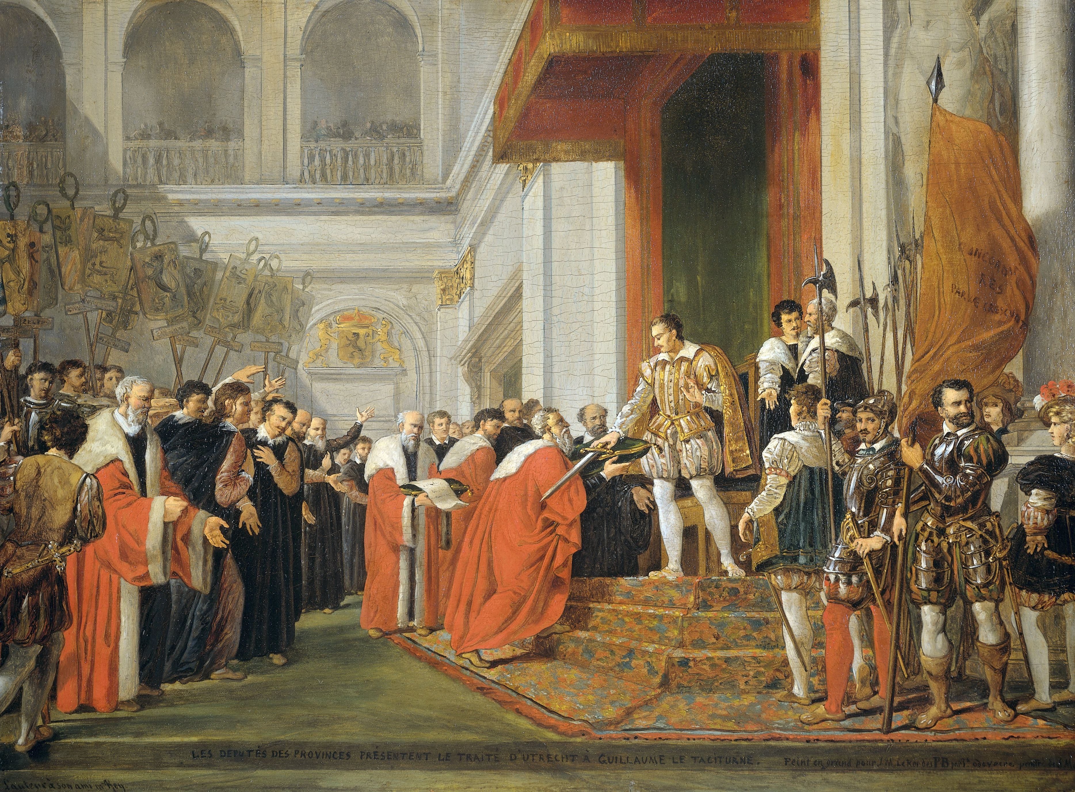 De afgevaardigden van de Nederlandse provincies bieden Willem van Oranje het tractaat van de Unie van Utrecht aan, 1579. In de zaal van een paleis biedt een oude man met baard Oranje een zwaard op een kussen aan, een ander draagt het document op een kussen. Rechts de soldaten in het gevolg van de prins met vaandel en hellebaarden. Links vertegenwoordigers van de provincies met banieren met de provinciewapens.